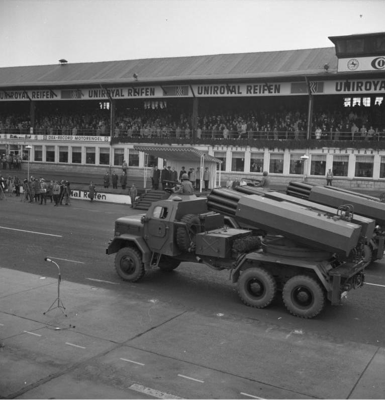 20 Jahre NATO. Bundeswehrparade auf dem Nürburgring Information added by Wikimedia users.Leichtes Artillerie-Raketen-System (LARS) 110 SF1 der Bundeswehr auf einem Magirus-Deutz 178 D 15 A Lkw.